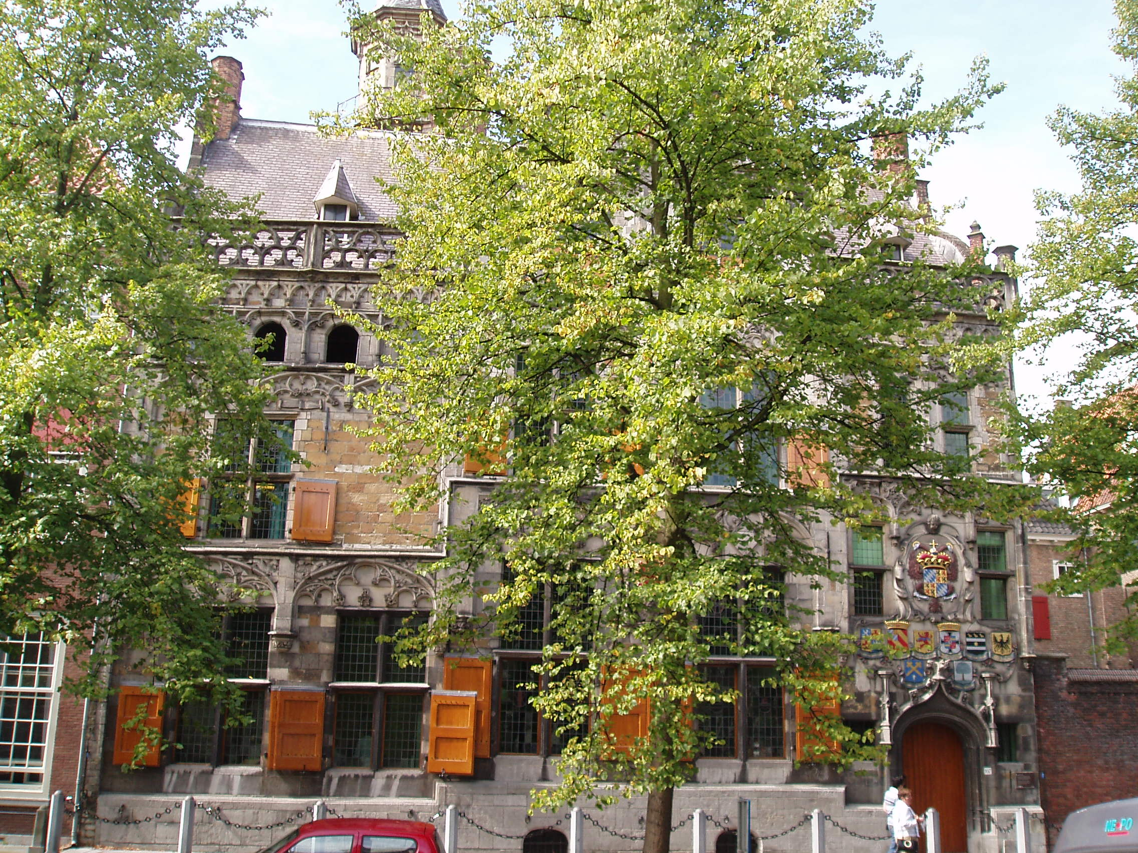 Building in Delft